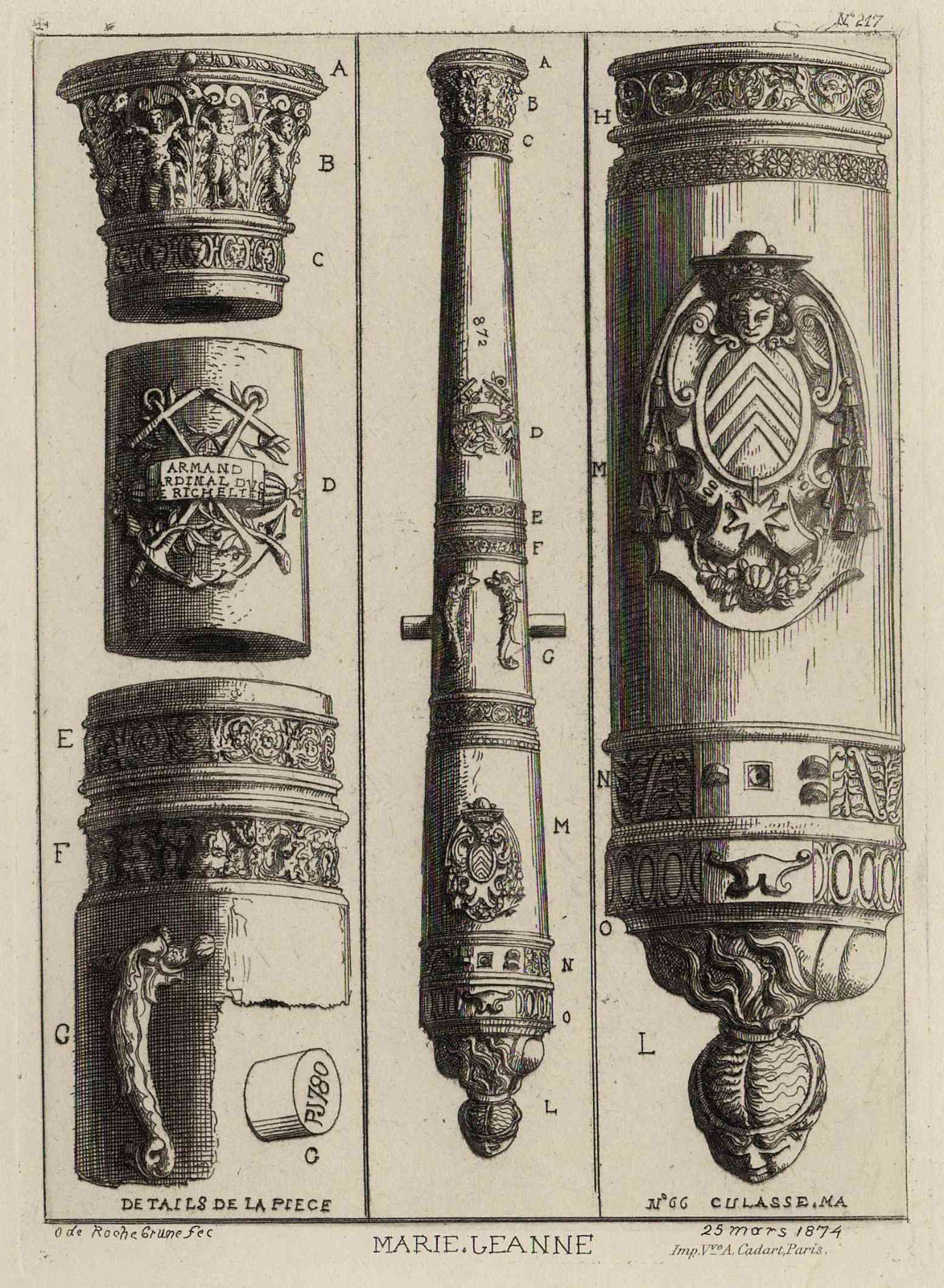 Marie-Jeanne, premier canon pris par les Vendéens le 16 mars 1793 au combat de Coron. Gravure d'Octave de Rochebrune publiée dans Souvenirs du Bocage vendéen de dom Joseph Roux (1874).